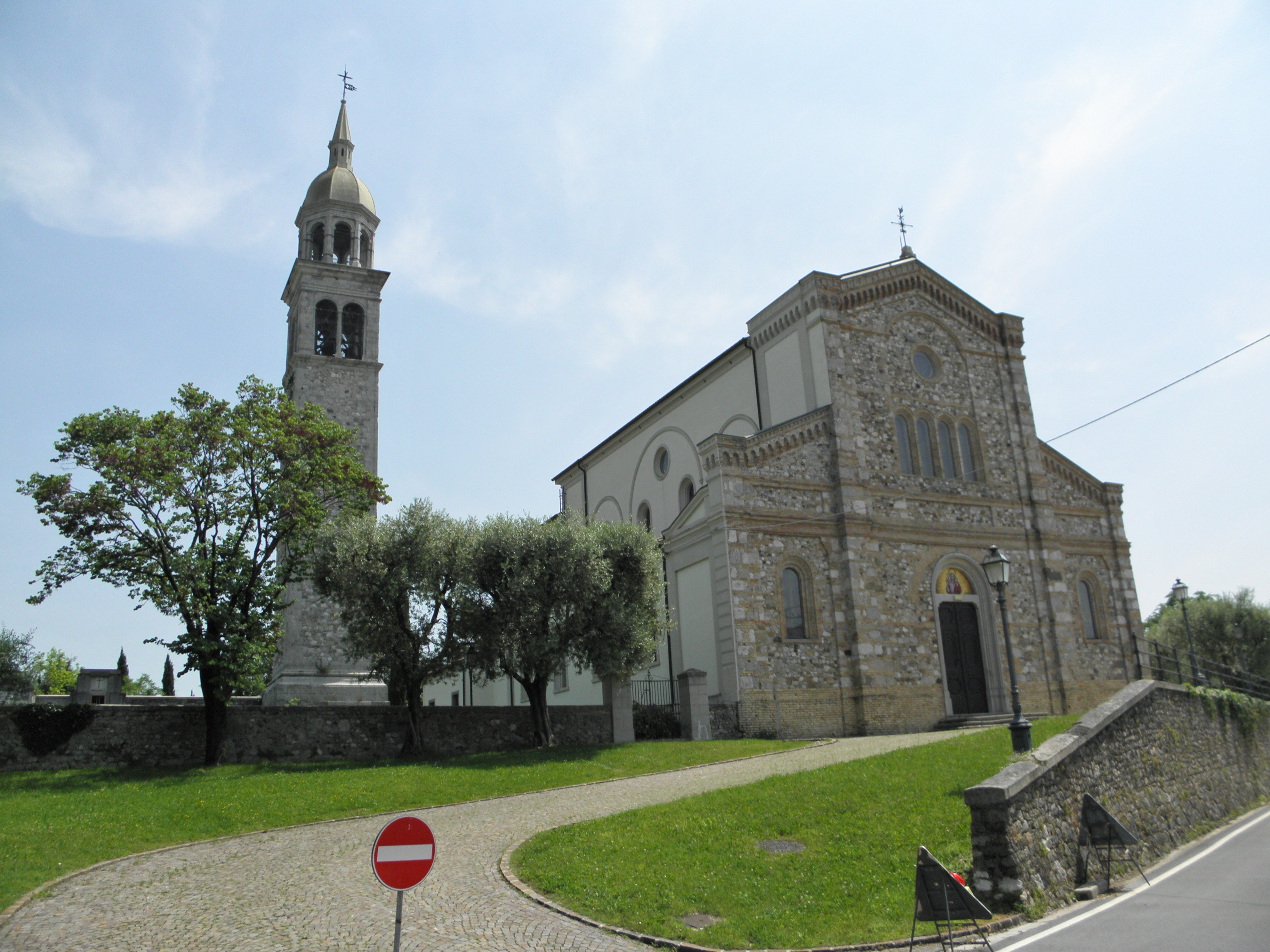 Villalta, frazione di Fagagna: la chiesa di San Pietro e San Paolo apostoli.